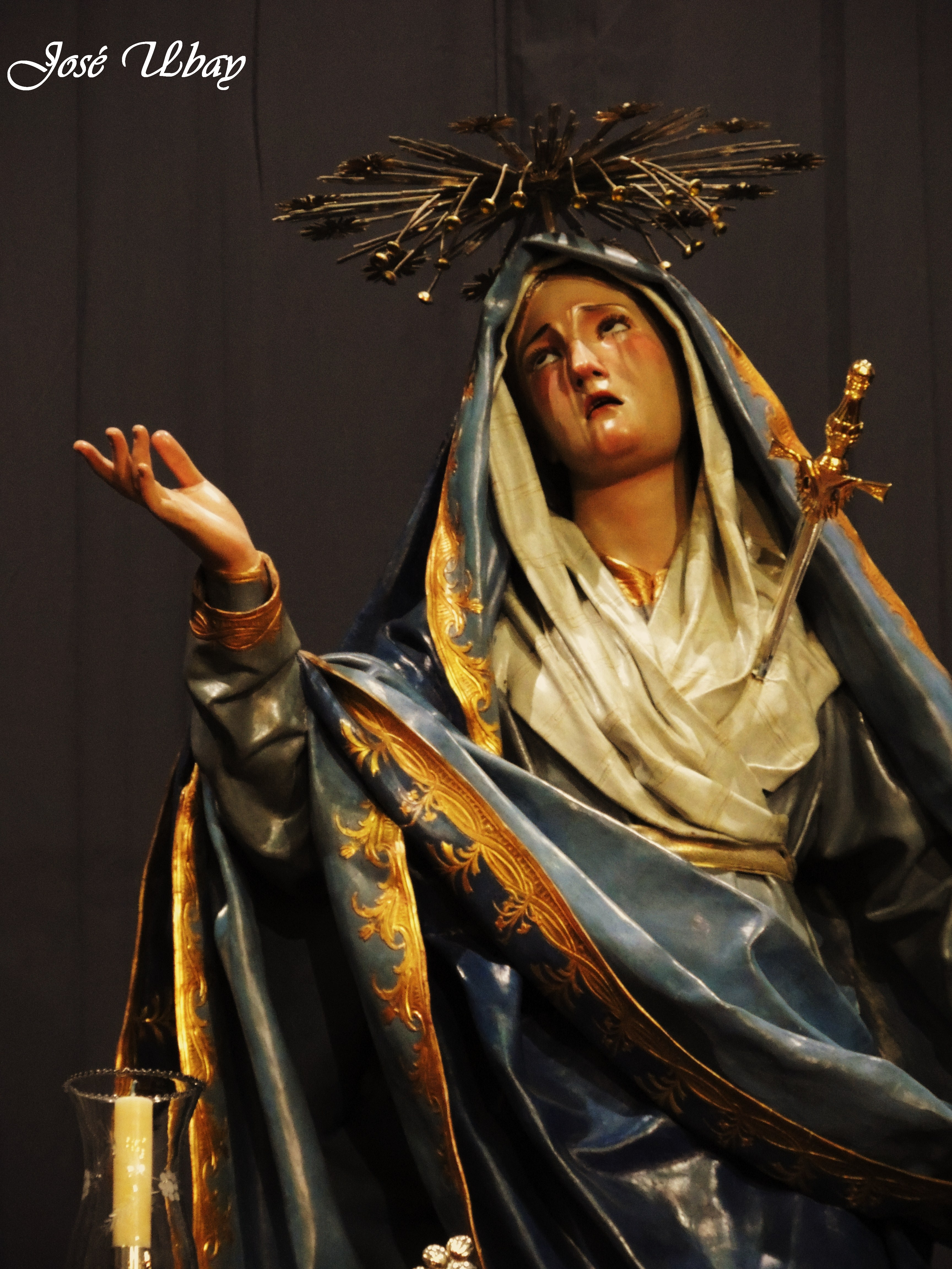 Santísima Virgen de Gloria. (1799-1806) José Luján Pérez. Parroquia de san Juan Bautista - Villa de La Orotava (Tenerife).